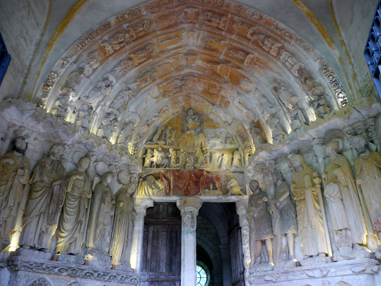 Portail de l'église romane de Mont-devant-Sassey, Meuse, Lorraine, France. Ce portail gothique de 1250 est dédié à la vierge, sur le modèle de celui de la Cathédrale de Reims. La statuaire gothique ainsi que sa polychromie sont d'origine.